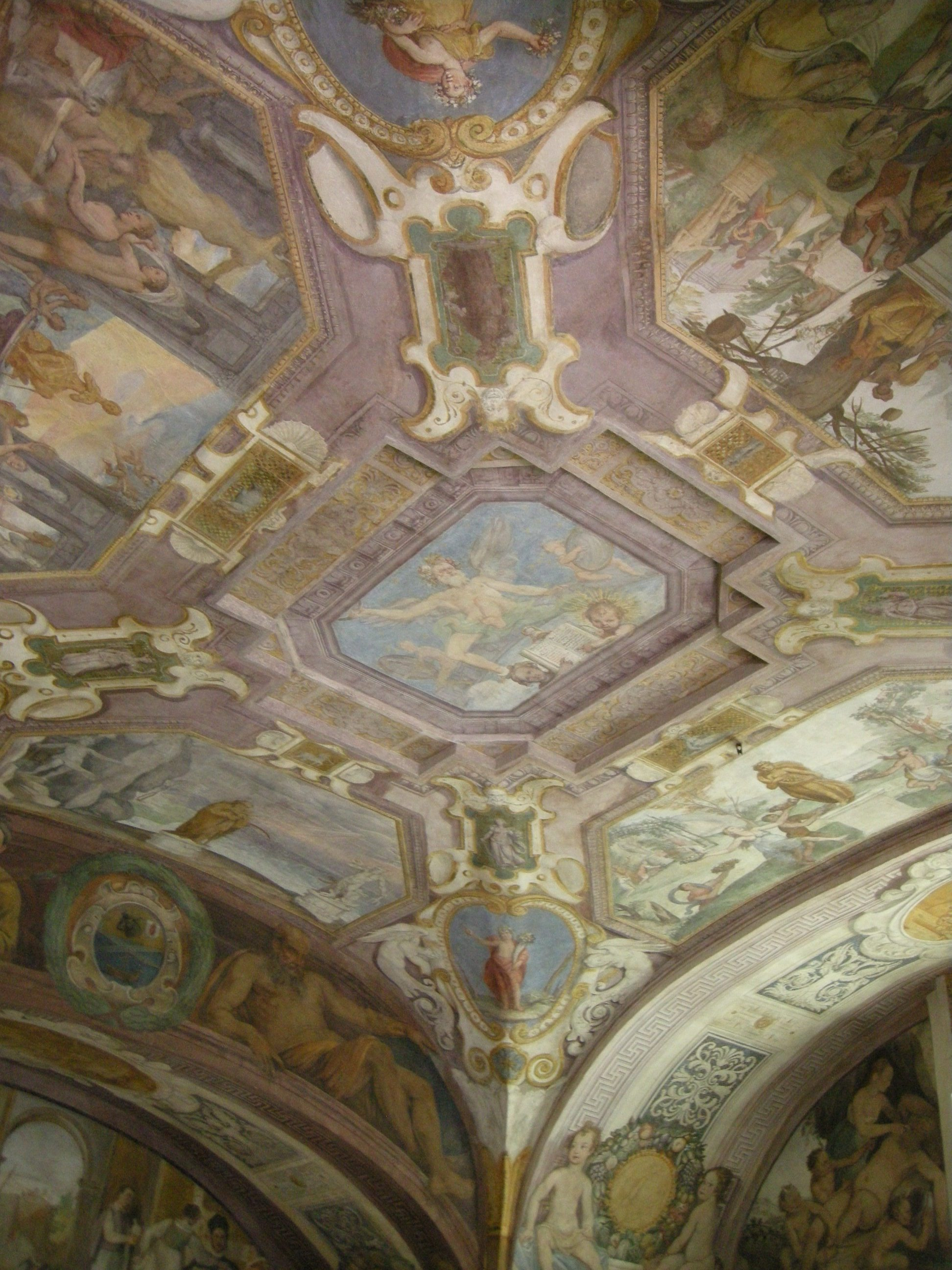 Palazzetto zuccari, affreschi di federico zuccari, volta